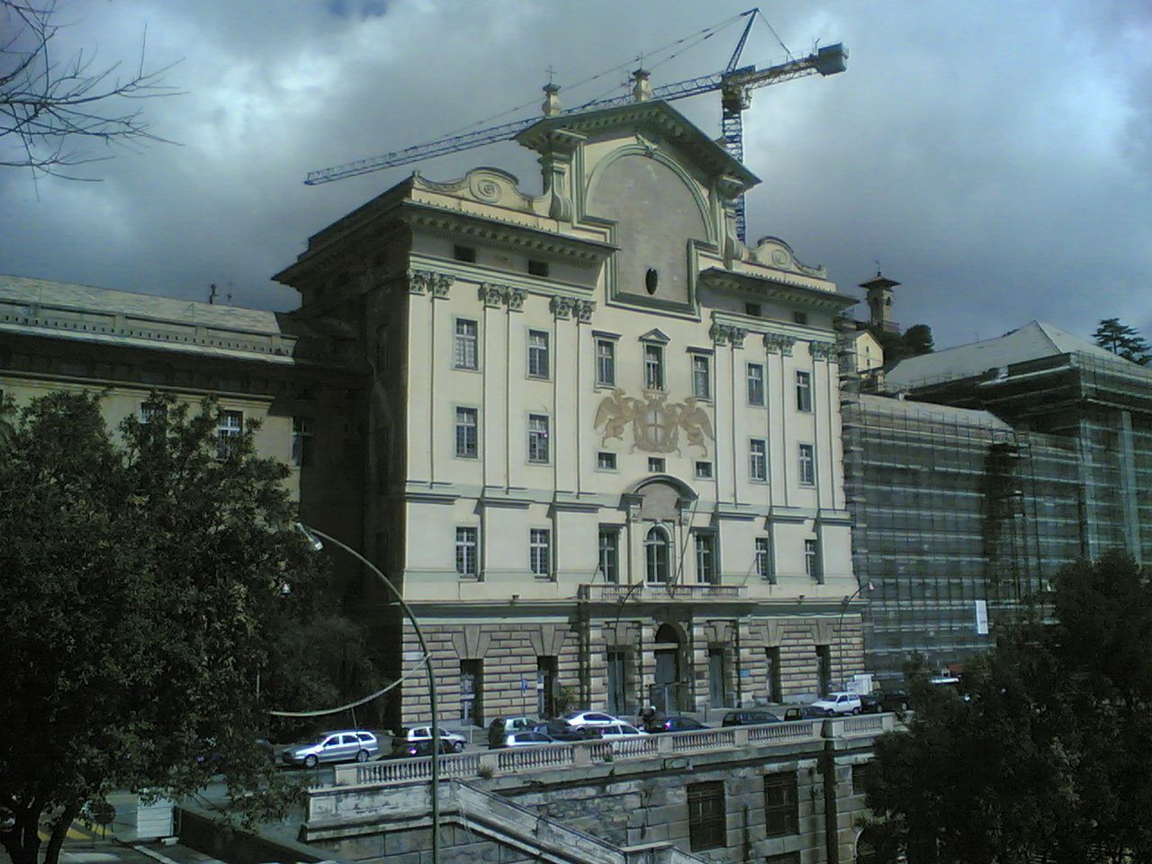 Albergo dei Poveri a Genova: facciata.